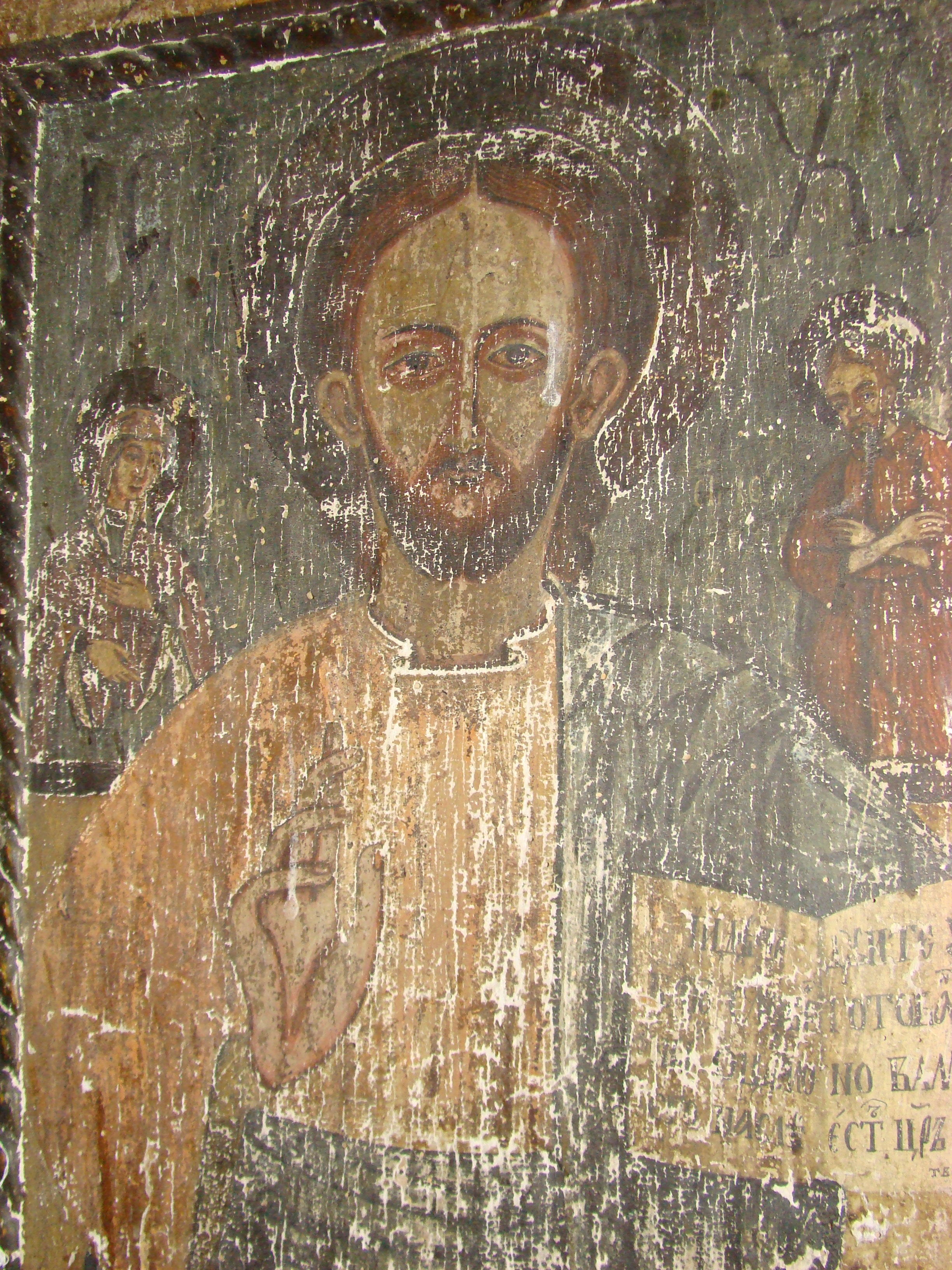 Biserica de lemn "Sf. Ioan Teologul", sat BRĂDET; comuna BUNTEŞTI